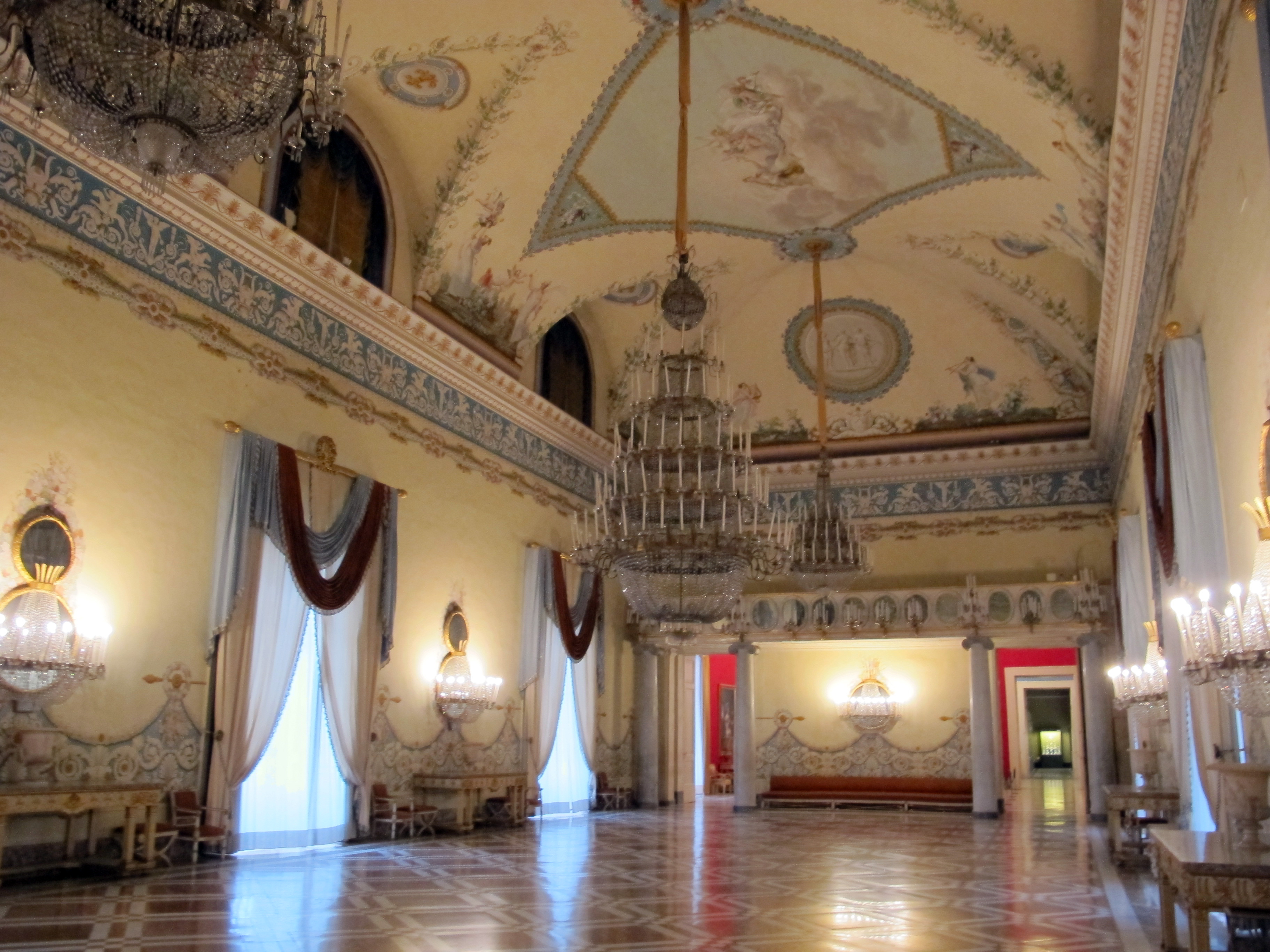 Appartamento Reale (Museo di Capodimonte)